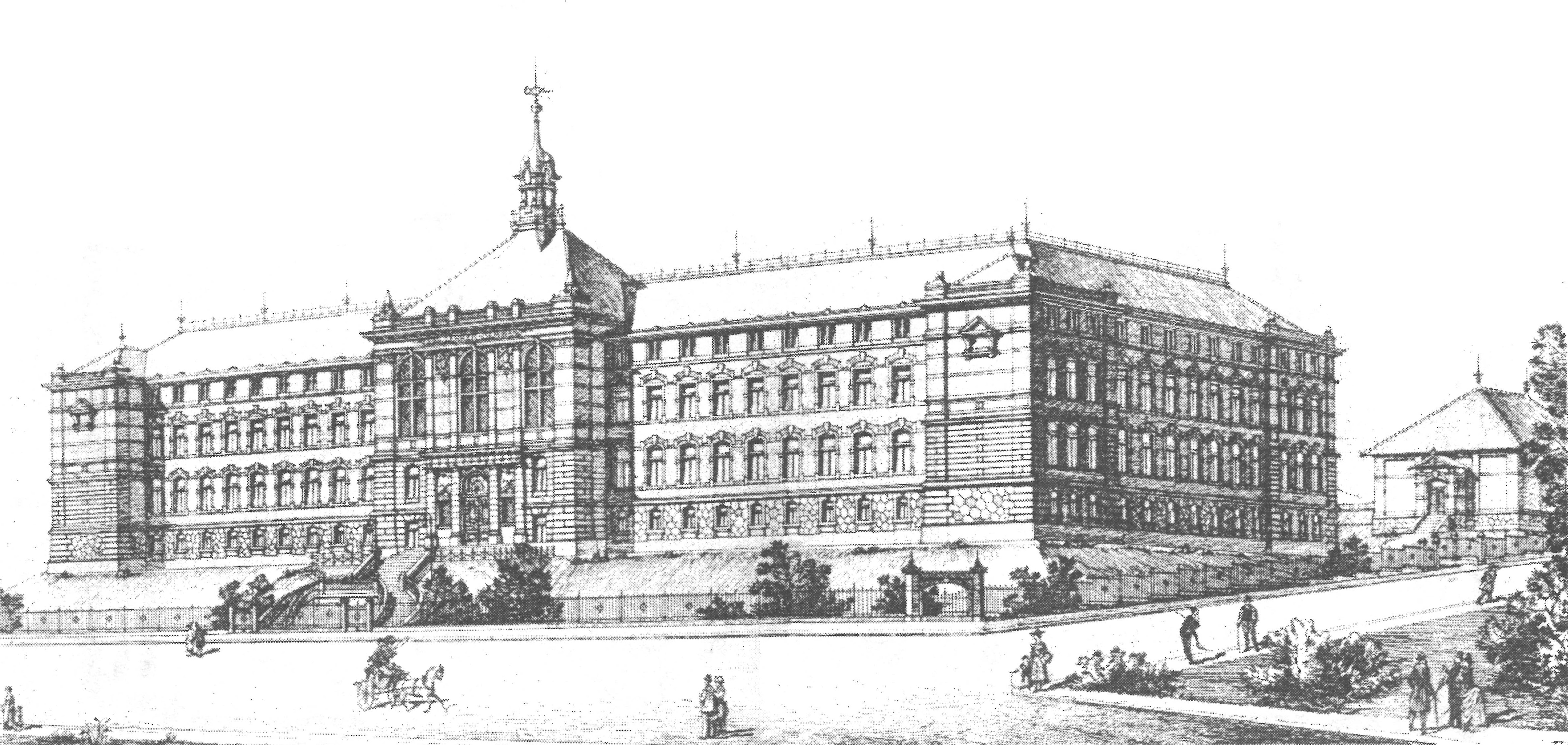 Gymnasium Dresden-Plauen, Nordfront des Seminargebäudes und Turnhalle, 1897